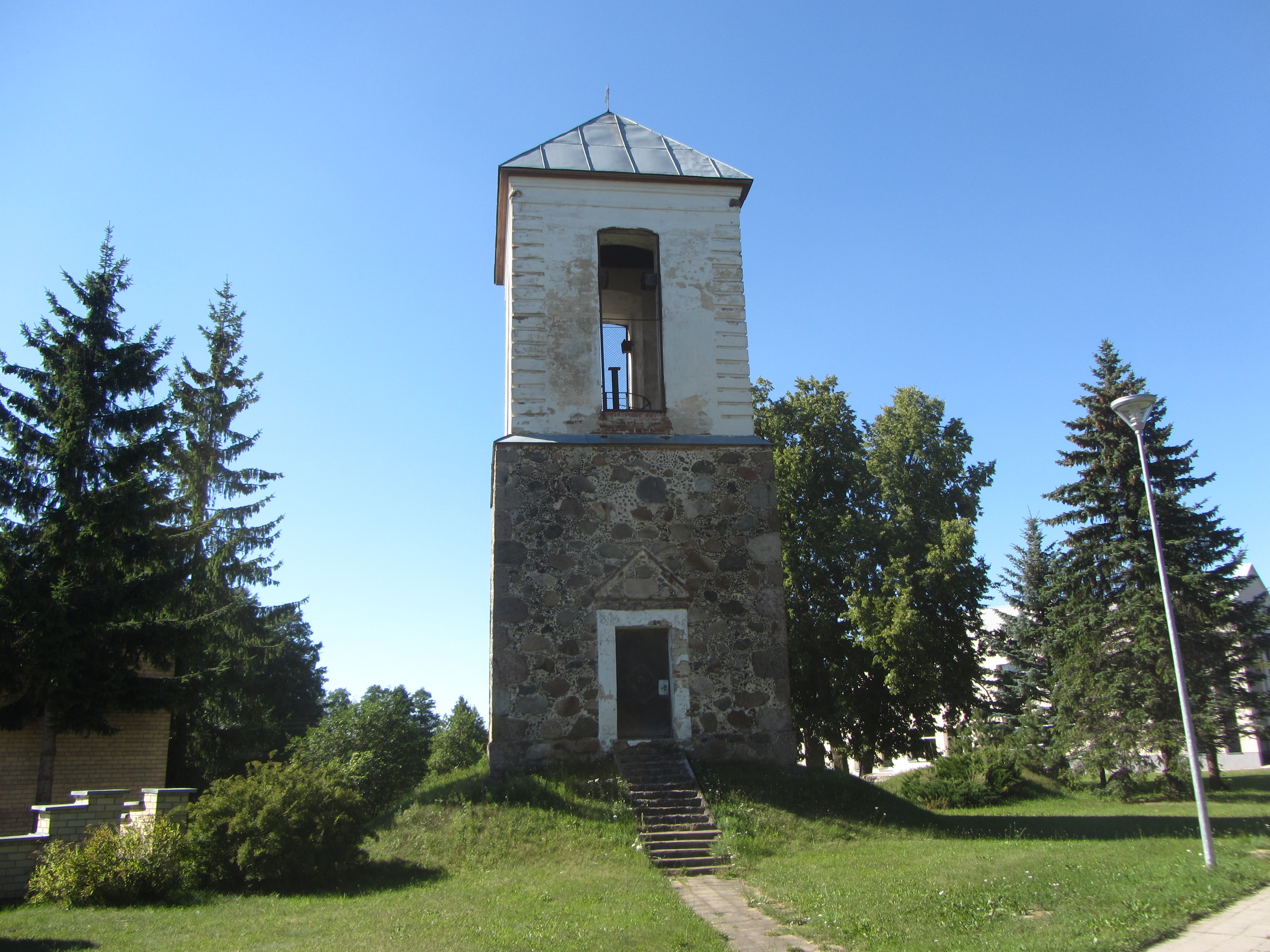 Skapiškis, Lithuania